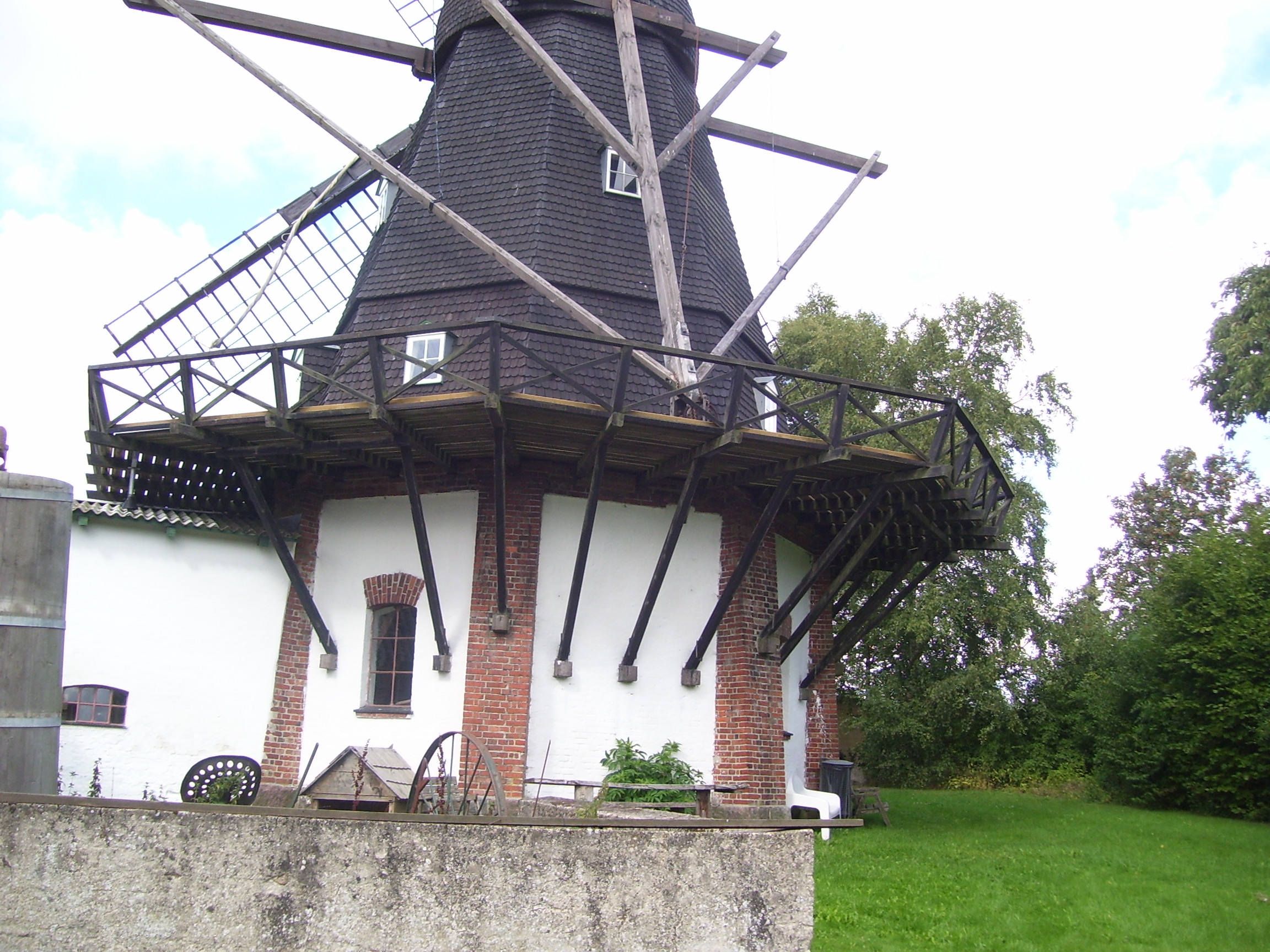 Undermøllen i Skenkelsø er grundmuret og med stræbepiller